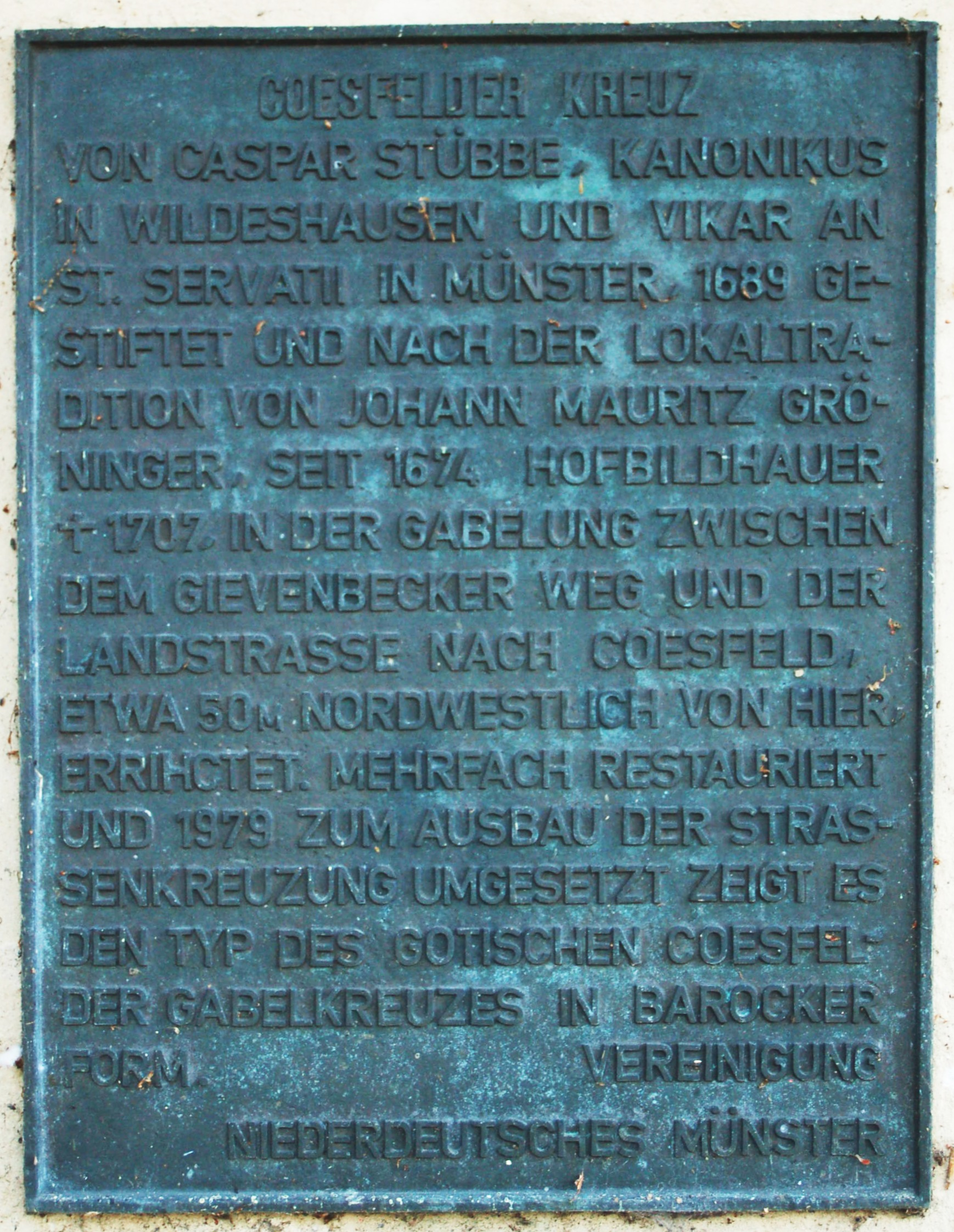 Die Inschrift am "Coesfelder Kreuz" in Münster, Westfalen.